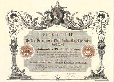 Aktie der Berlin-Dresdner Eisenbahngesellschaft